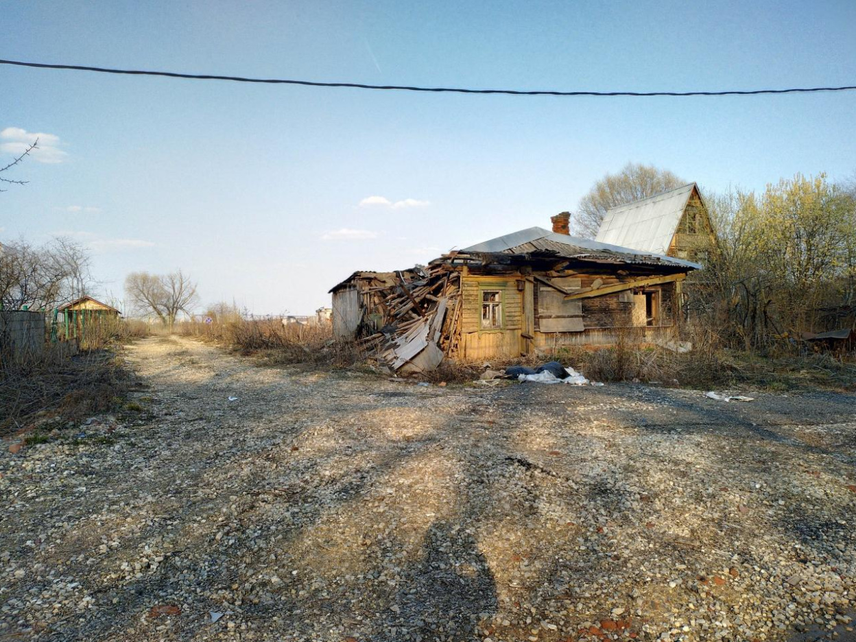 Разваленный дом, Щиброво